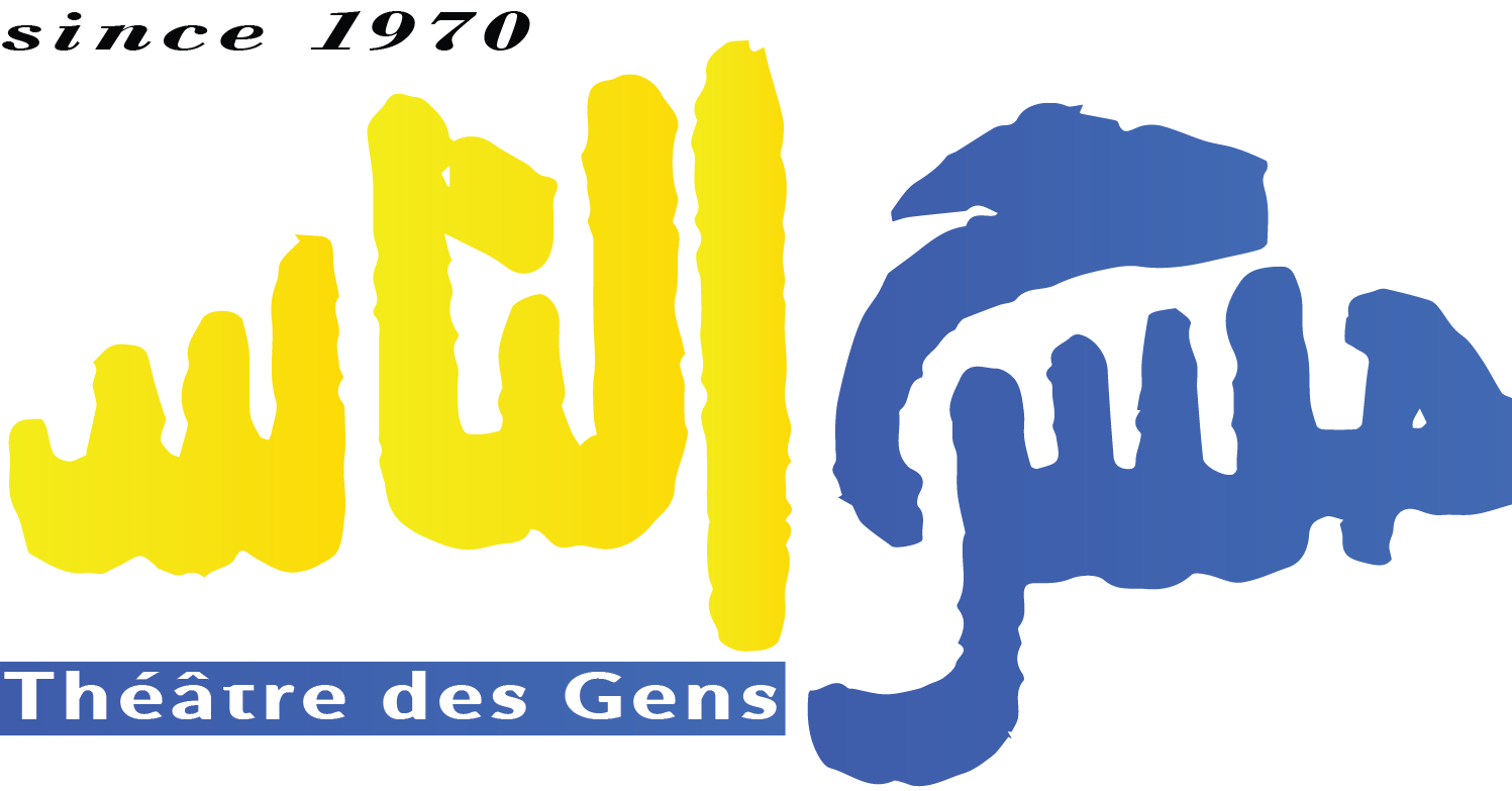 Théâtre des gens Calligraphie de Tayeb Saddiki